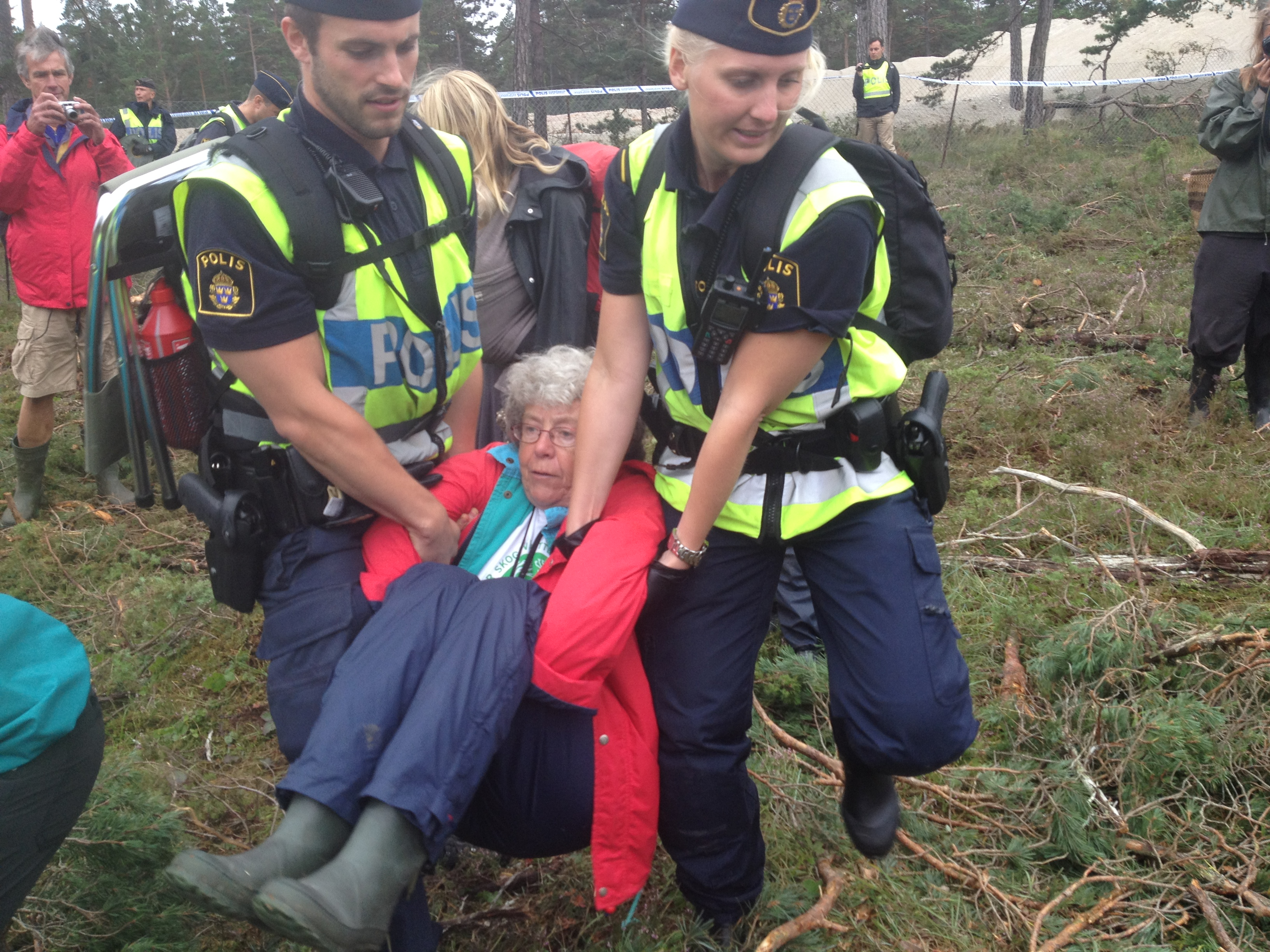 Lokalbefolkningen på Gotland protesterar mot avverkningarna i Ojnareskogen och blir bortburna av polis.